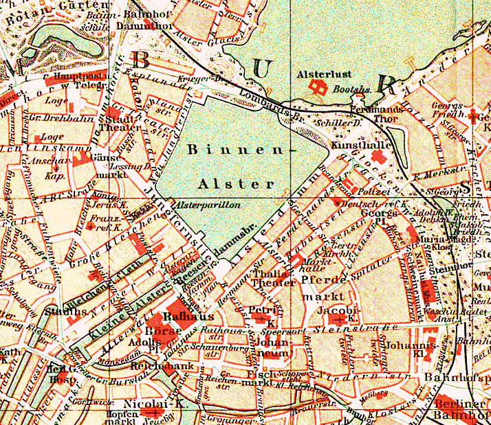 Plan der Hamburger Innenstadt